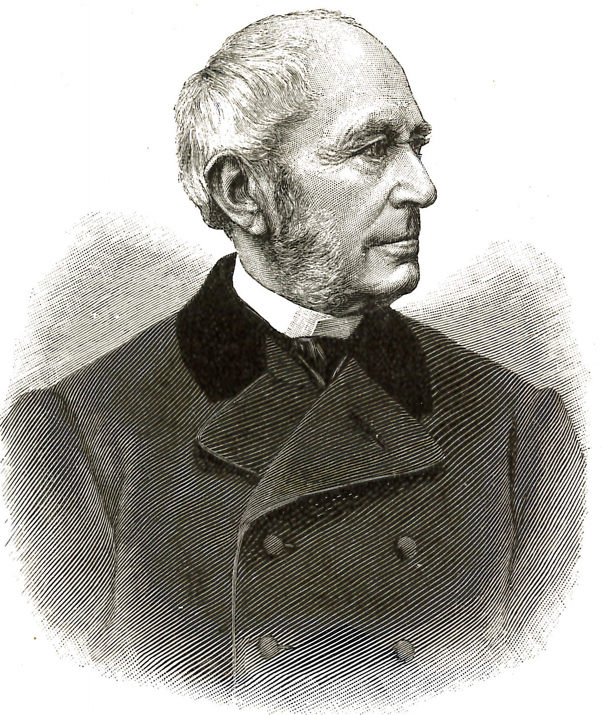 Jakob Georg Bodemer, Pionier der Textilindustrie in Zschopau, Aufnahme aus "Bunte Bilder aus dem Sachsenlande", Leipzig 1907